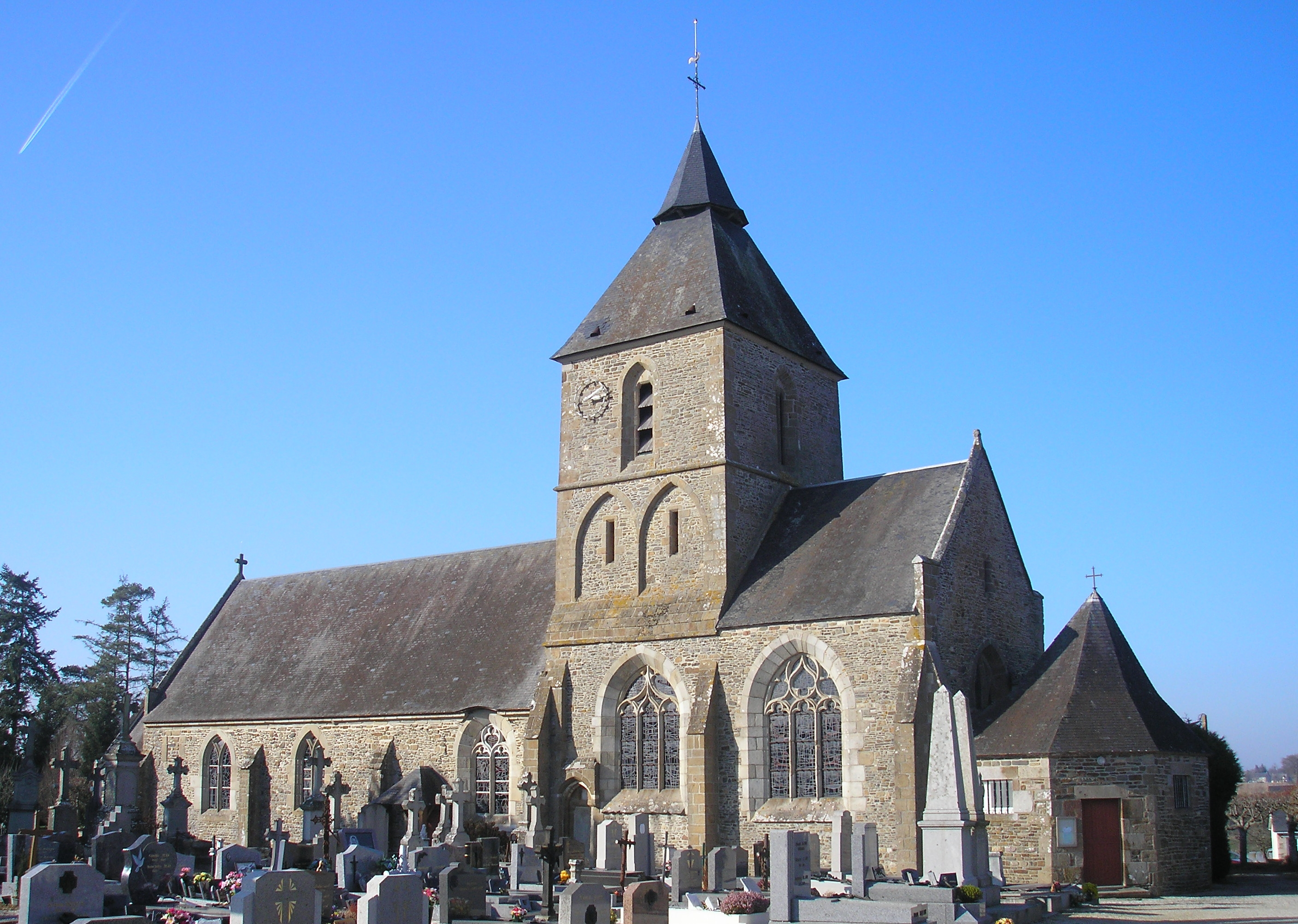 Coulonces (Normandie, France). L'église Saint-Gilles (ISMH, 19/03/1927).